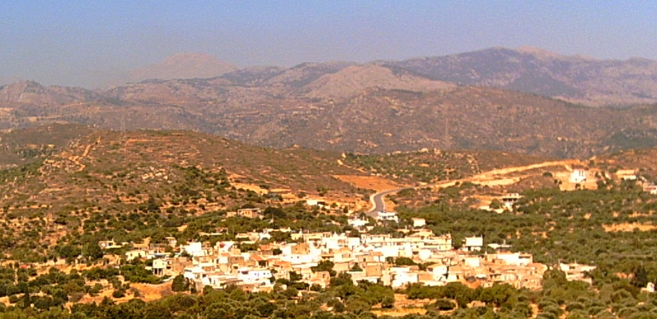 Άποψη του χωριού Μεσελέροι